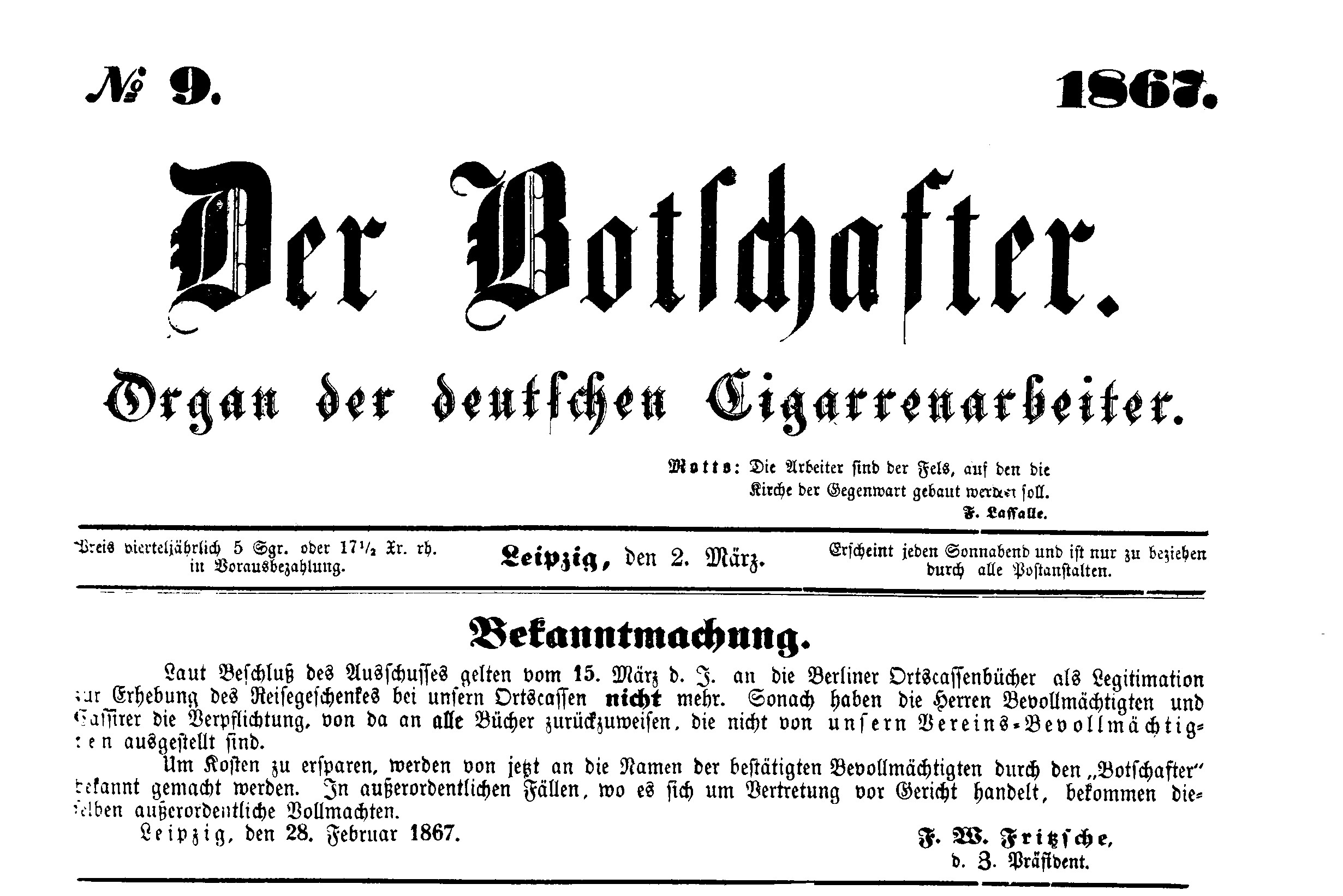 Der Botschafter Organ der Zigarrenabeiter vom 2. März 1867